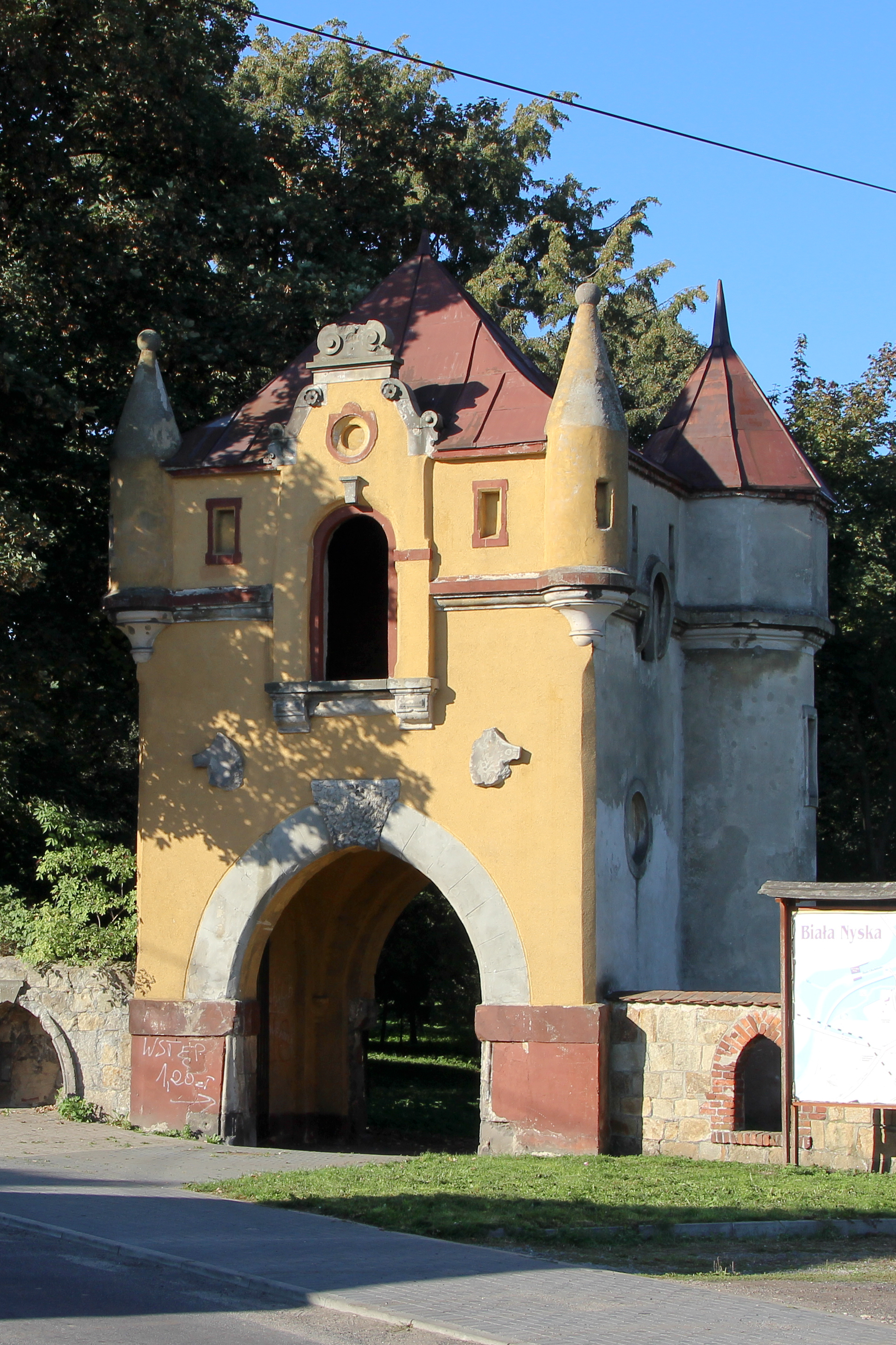 Biała Nyska – zespół zamkowy, brama wjazdowa.